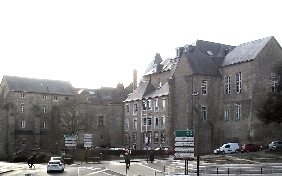 Palais des comtes du Maine et collégiale St Pierre la cour